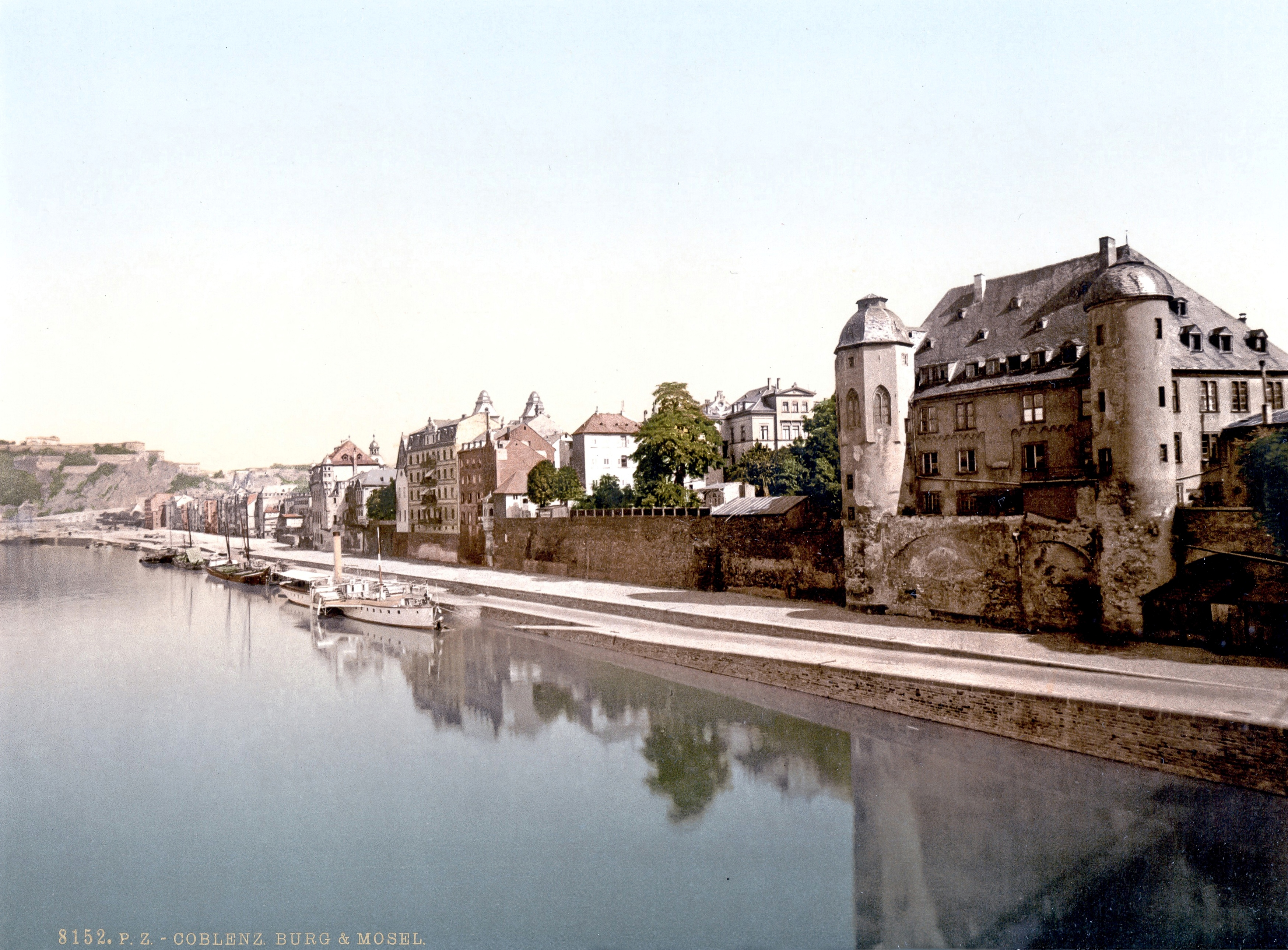 Alte Burg in Koblenz, Deutschland